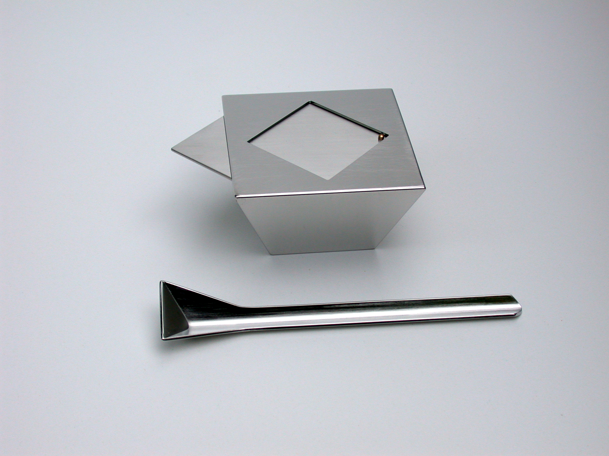 Schiffchen, Werk von Josef Caminada